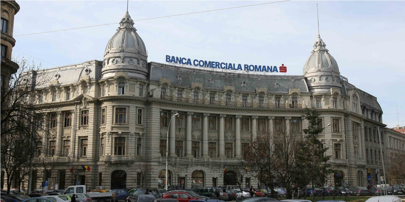 Sediul Central al Băncii Comerciale Române